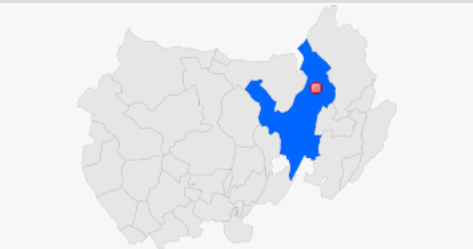 Localització de Montargull dins del municipi d'Artesa de Segre